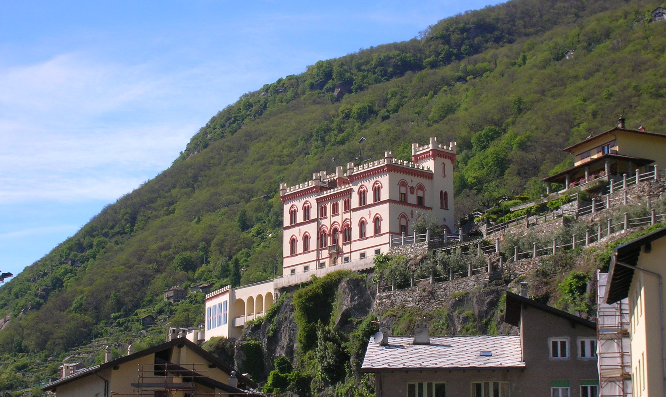 Castello Baraing di Pont-Saint-Martin, Valle d'Aosta, Italia.